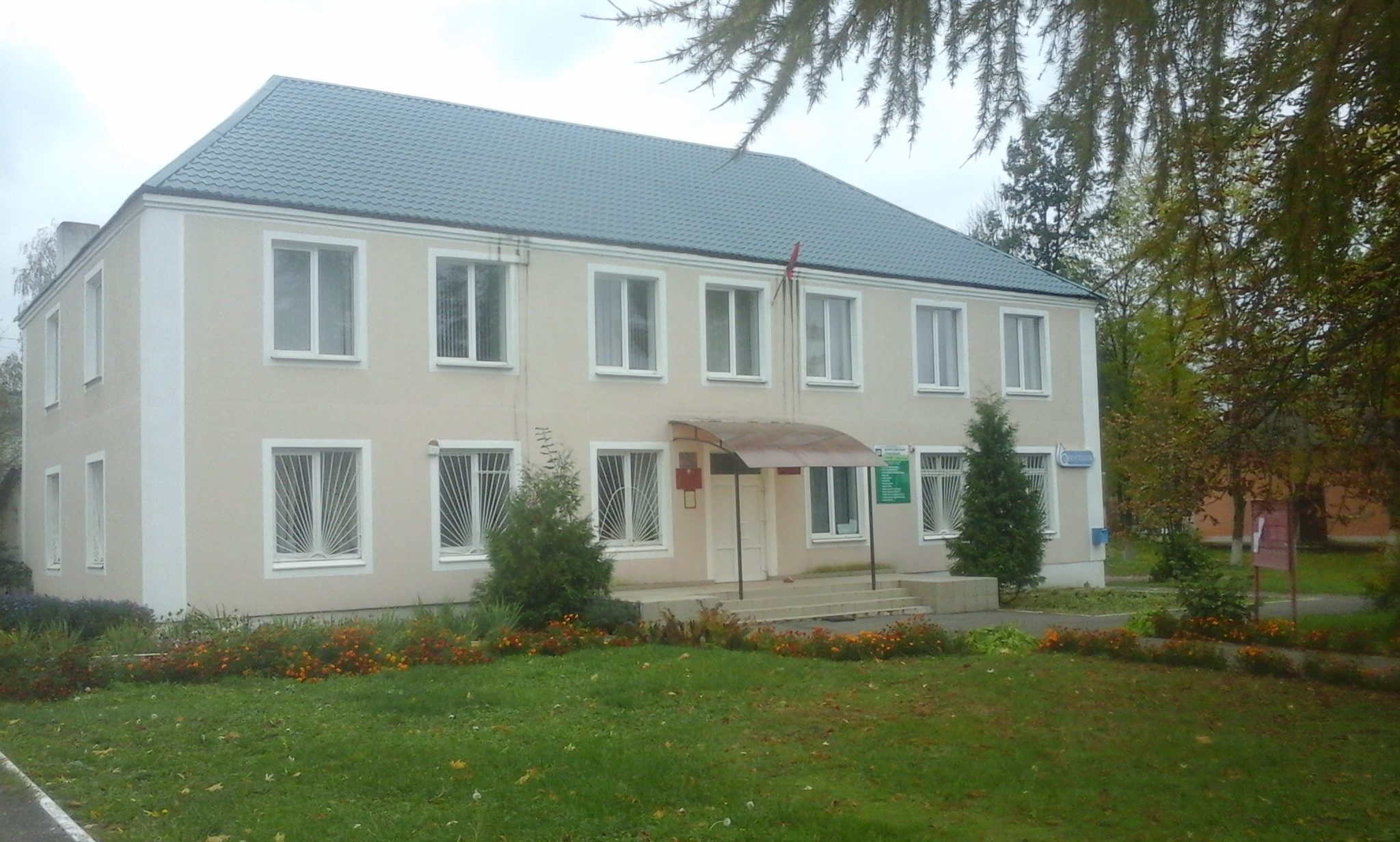 Здание сельсовета